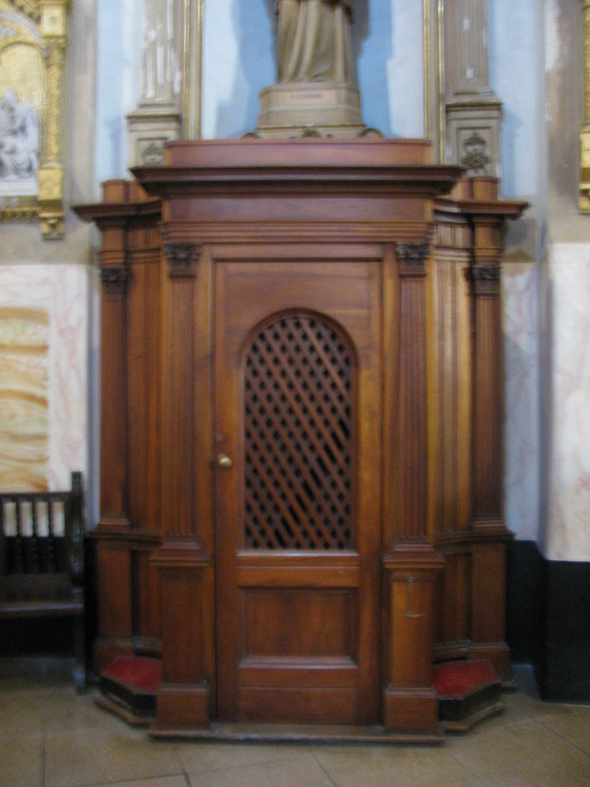 Confesionario